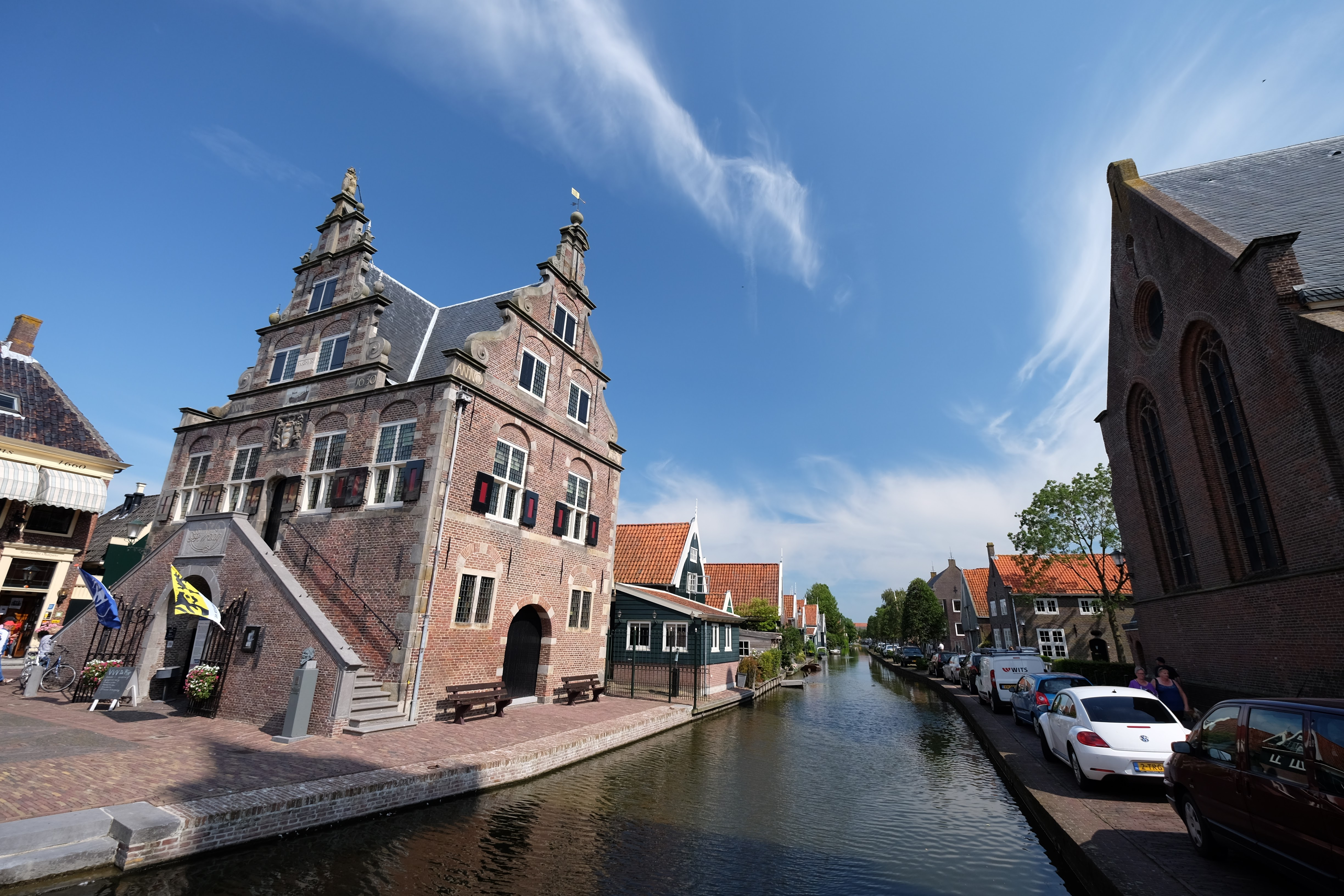 1483 De Rijp, Netherlands